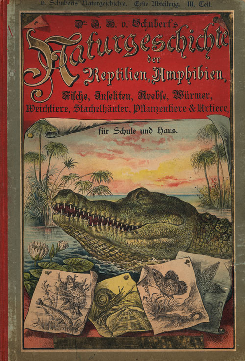 Gotthilf Heinrich von Schubert: Naturgeschichte der Reptilien, Amphibien, Fische, Insekten, Krebstiere, Würmer, Weichtiere, Stachelhäuter, Pflanzentiere und Urtiere. Zum Anschauungs-Unterricht für die Jugend. 10. Auflage. Schreiber, Esslingen und München, um 1890.